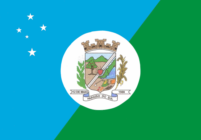 Bandeira do município de Paraíso do Sul